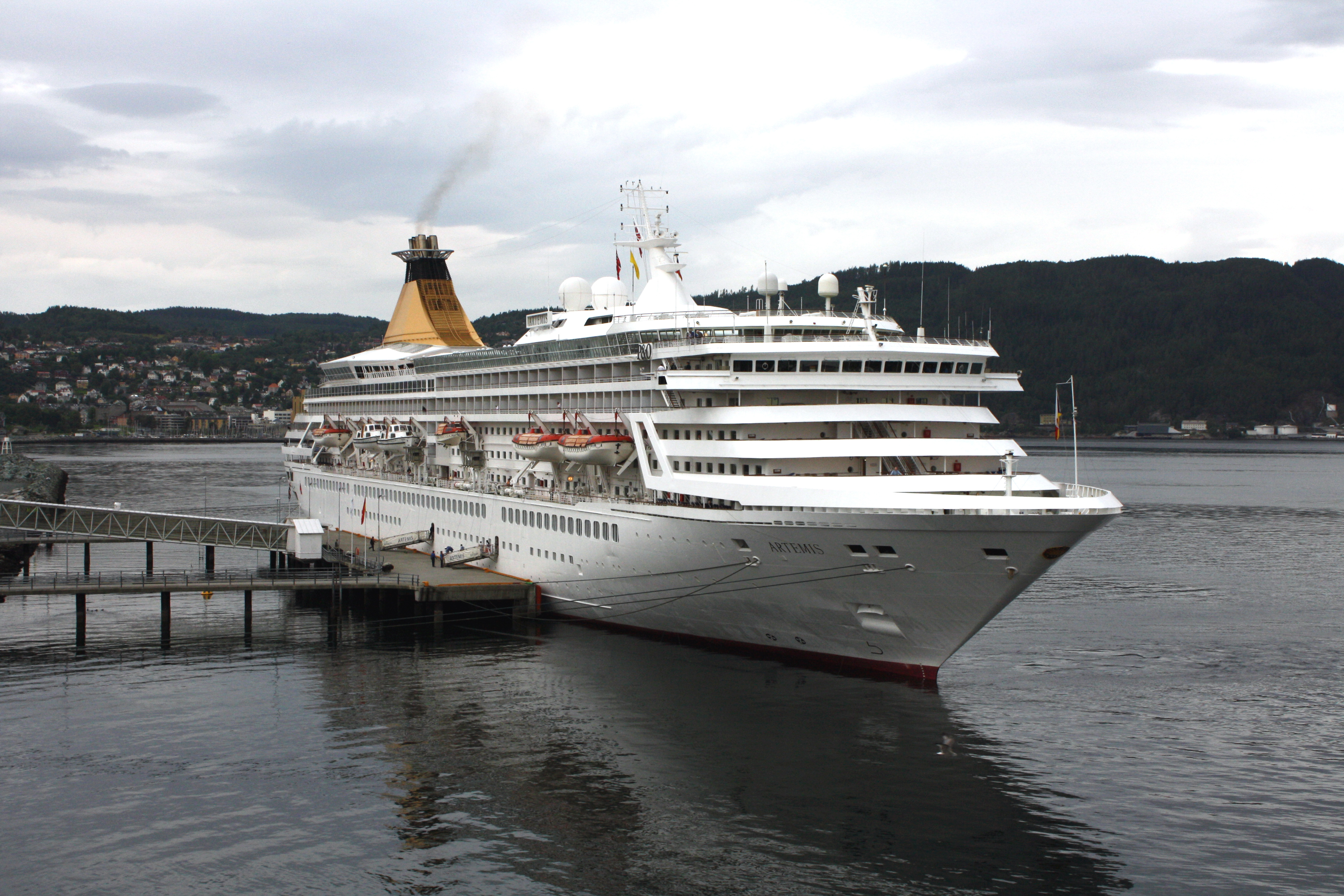 Cruiseskipet Artemis i Trondheim havn den 3. august 2009.